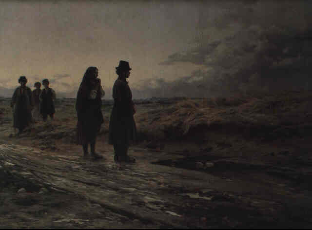 "Po burzy", olej na płótnie, 125,7 x 170,3 cm